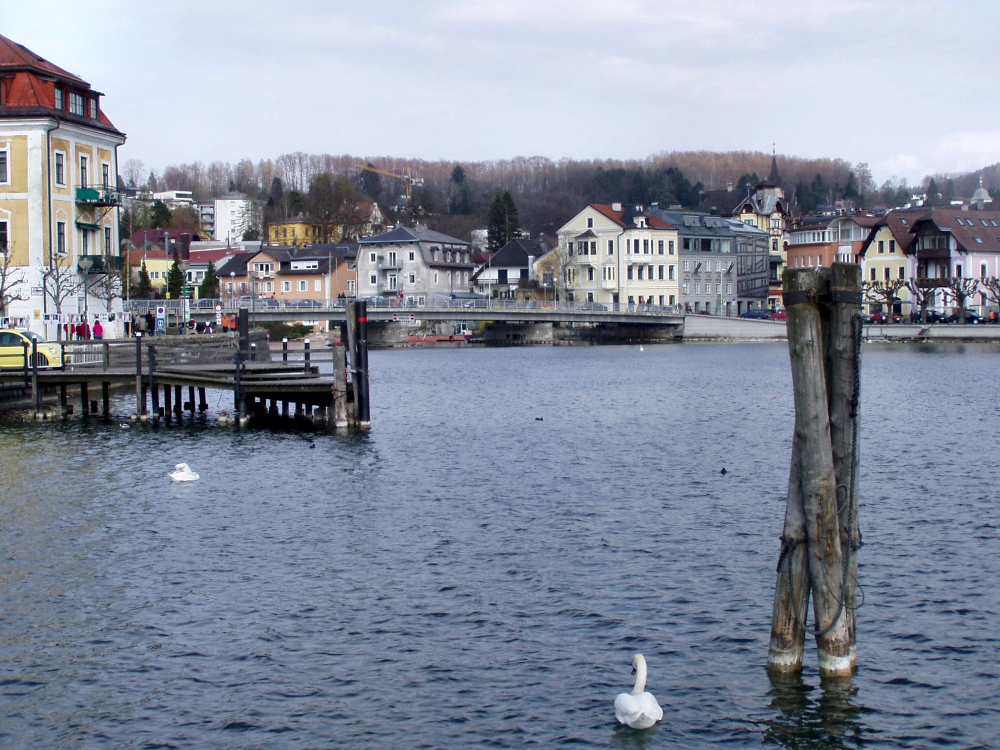 Abfluss der Traun aus dem Traunsee